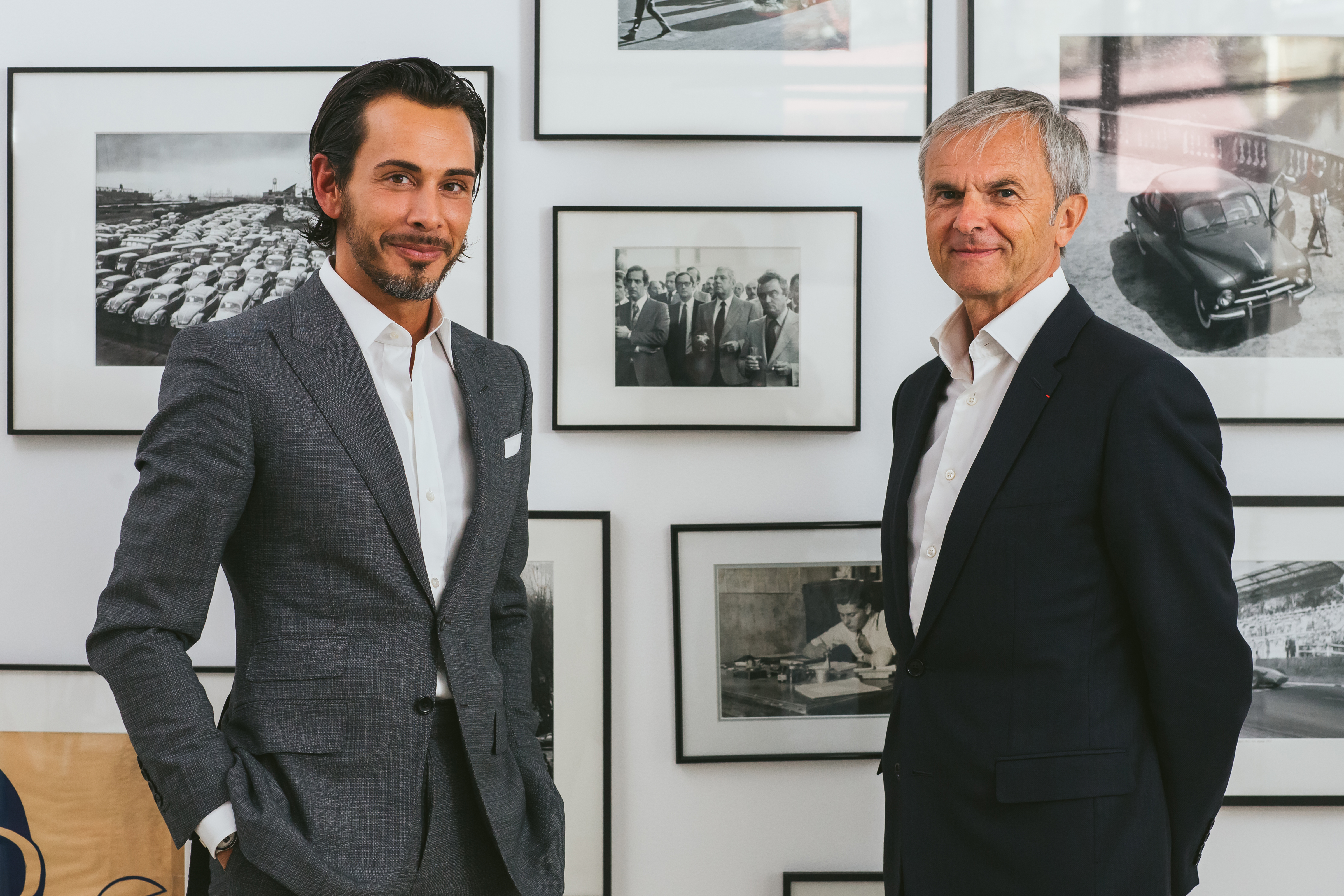 Portrait de monsieur Edouard Schumacher et monsieur Olivier Lamirault 25 09 2018 ©laurinepaumardphotographe